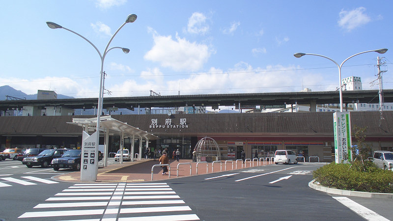 벳푸 역 동쪽 출입구(가이간 출입구) 모습.